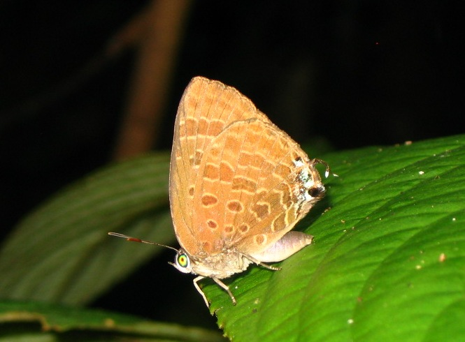 Arhopala - non identifié, Selangor - Malaisie